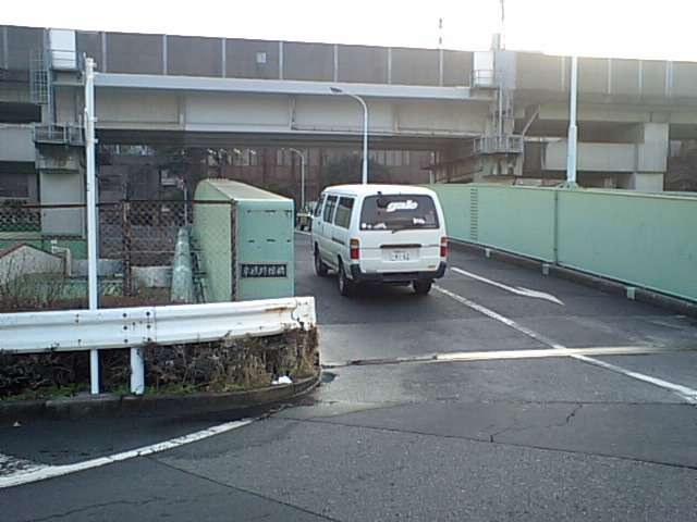 車坂跨線橋（東京都北区上中里）